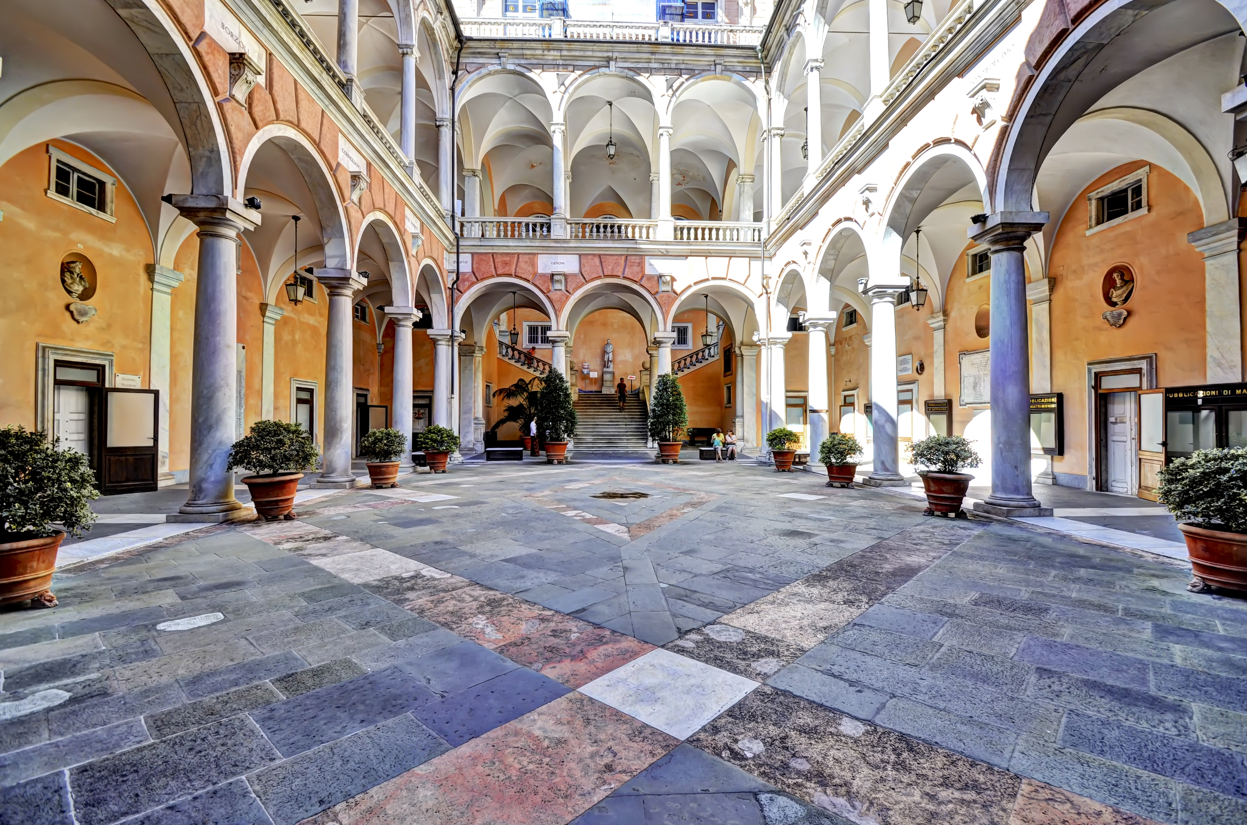 Palazzo Doria-Tursi - Musei di Strada Nuova This is a photo of a monument which is part of cultural heritage of Italy.